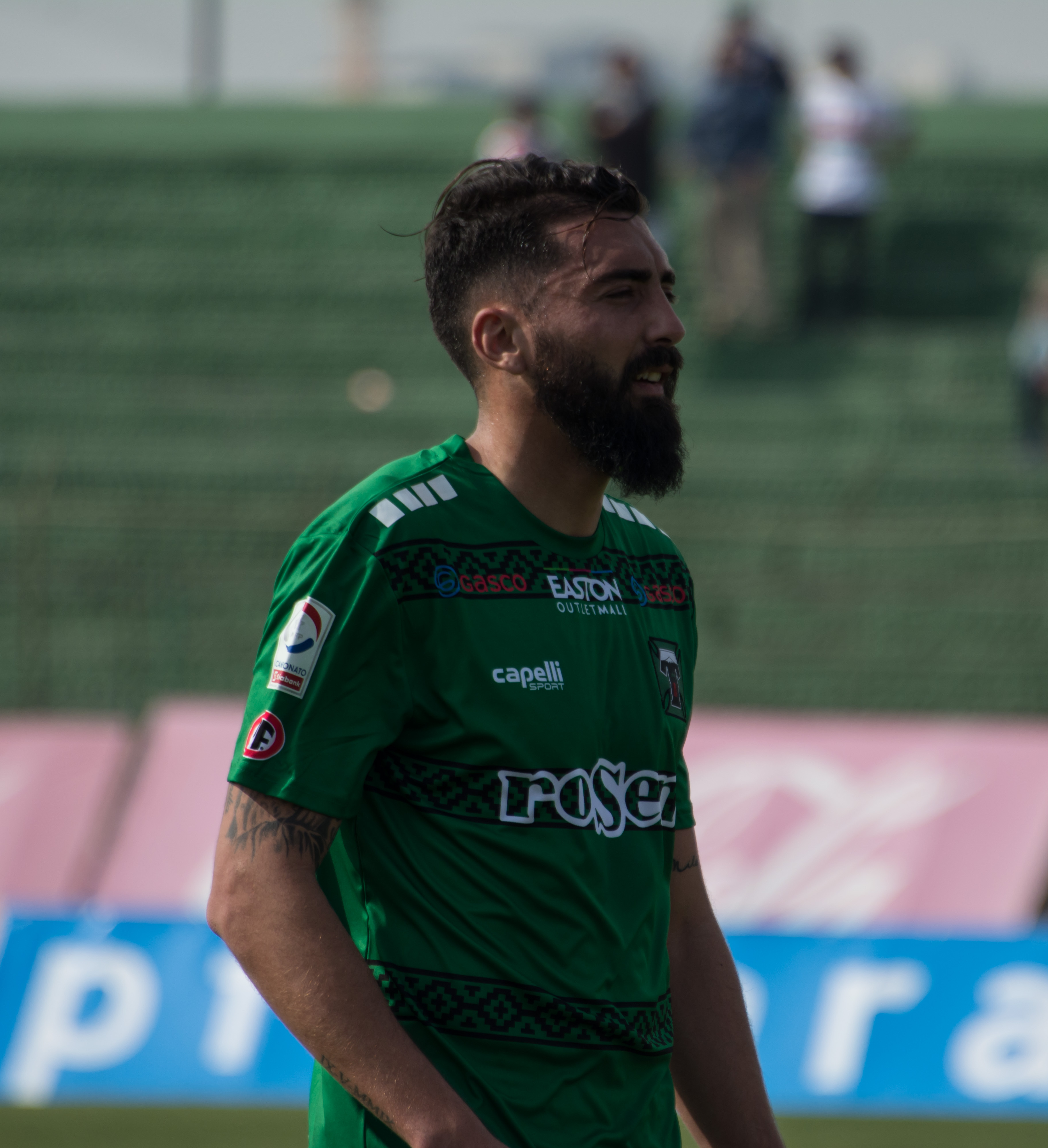 Nicolás Bertochi, Palestino v Deportes Temuco, Estadio Municipal de La Cisterna, La Cisterna, Santiago, Chile